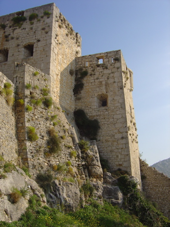 Detalj Kliške tvrđave. Kao autor ove slike stavljam kao javno dobro jedino je potrebno spomenuti moje ime Karlo Å iljeg kao autor ove slike.